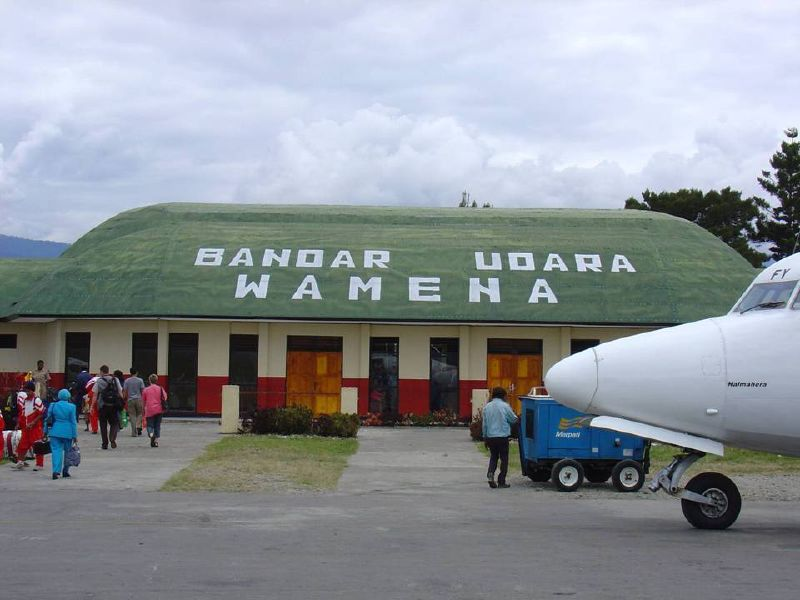 Wamena Airport, Papua Province, Indonesia